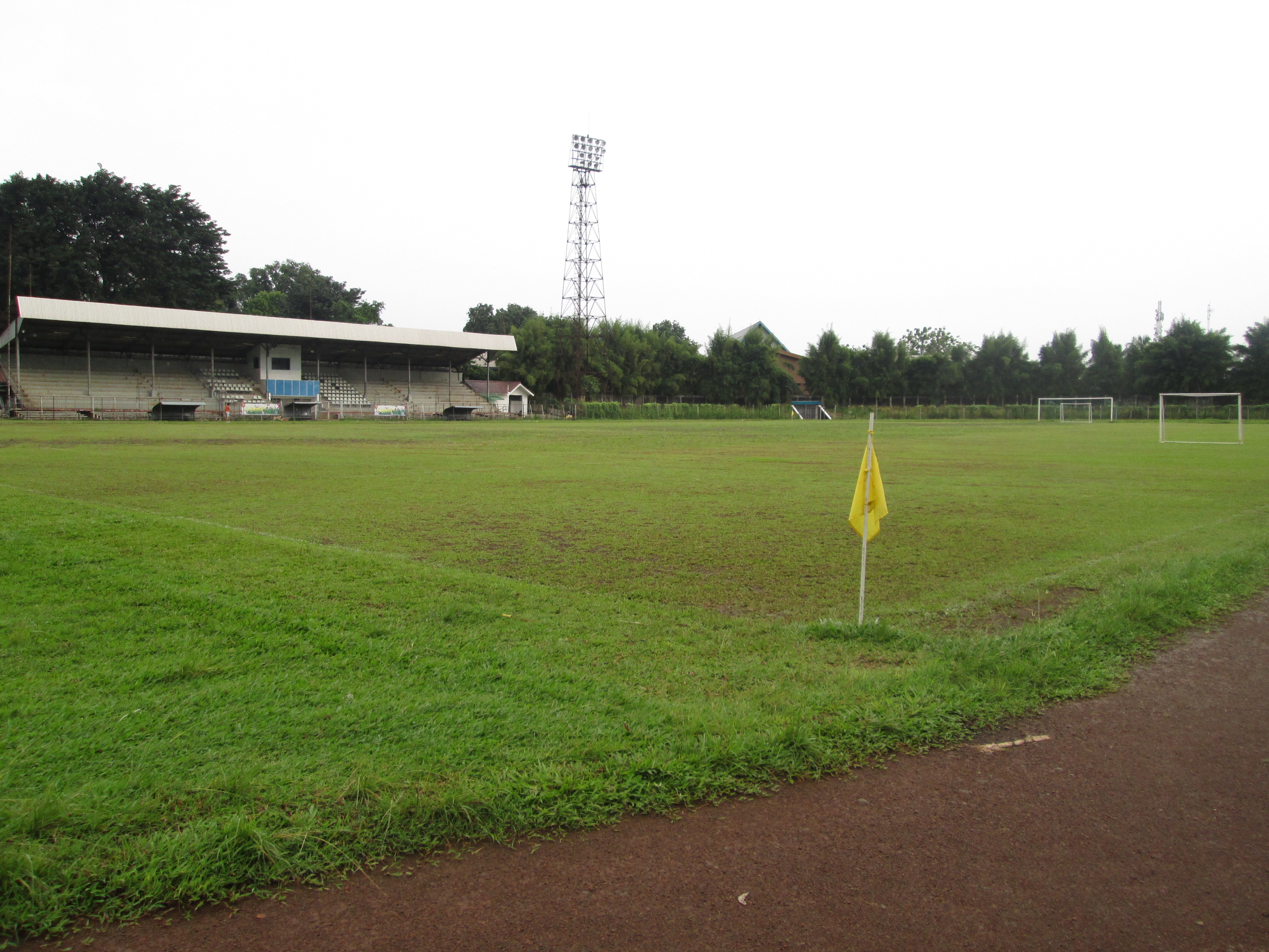 Stadion Utama GOR Pajajaran, Kota Bogor